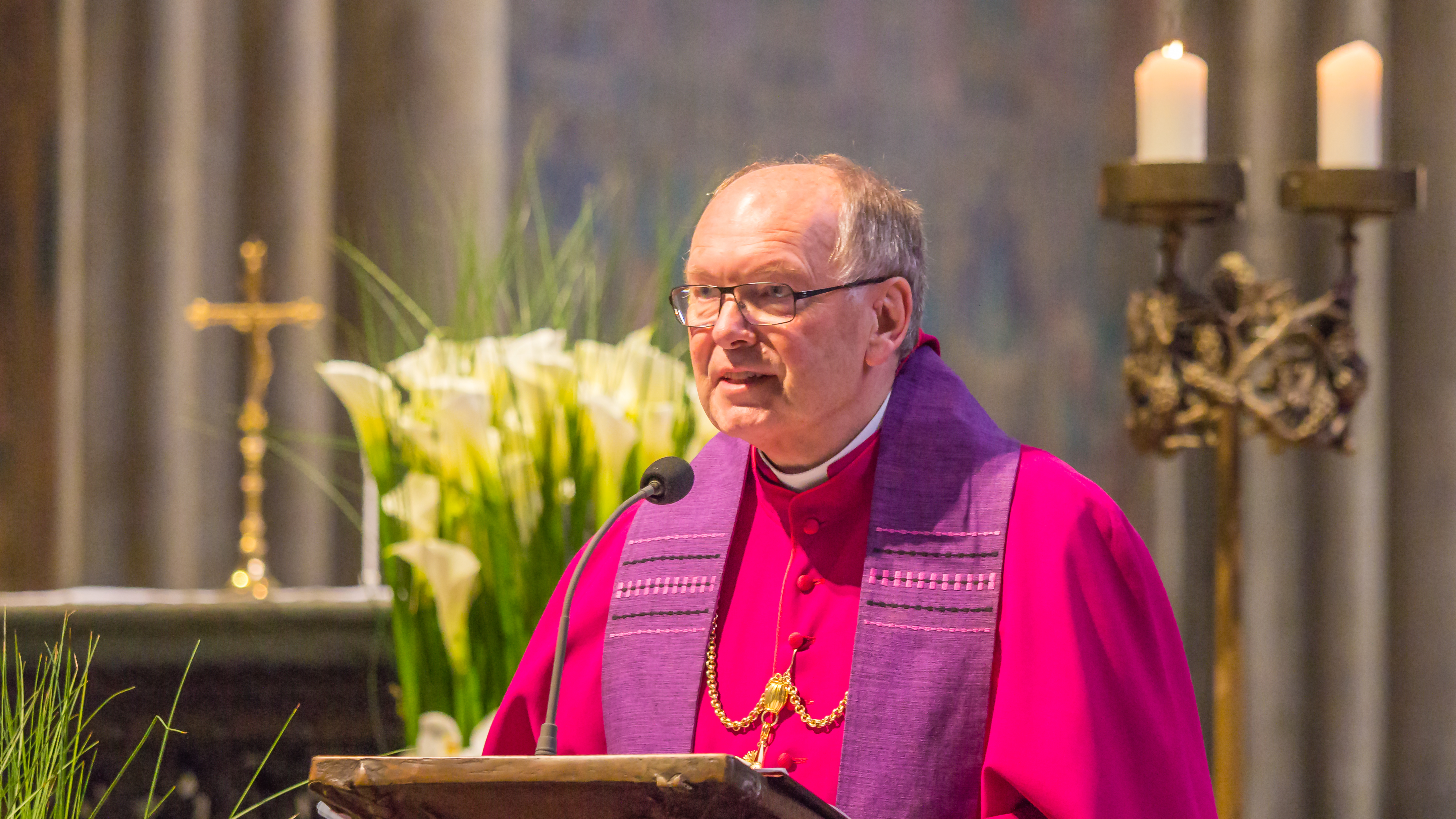 Trauerfeier für den Kölner Verleger Alfred Neven DuMont im Kölner Dom Begrüßung durch Dompropst Gerd Bachner